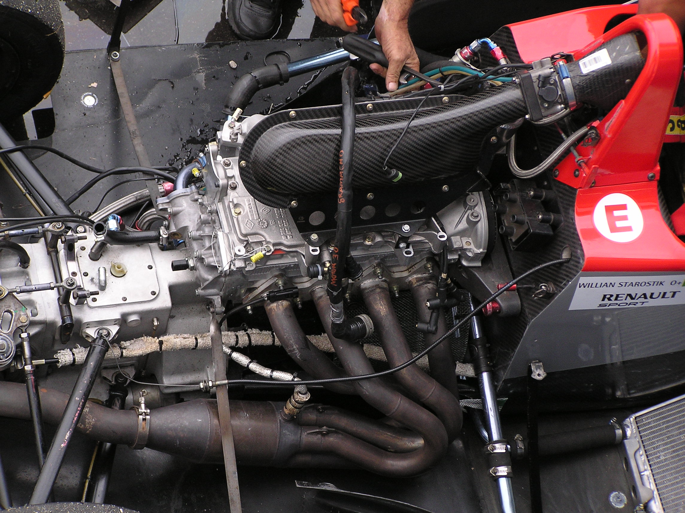 Formula Renault engine: Renault F4R FRS (ver.2006), 4 cilindros, 16 valves (Renault Clio RS 2 litros), 1.998 cm3